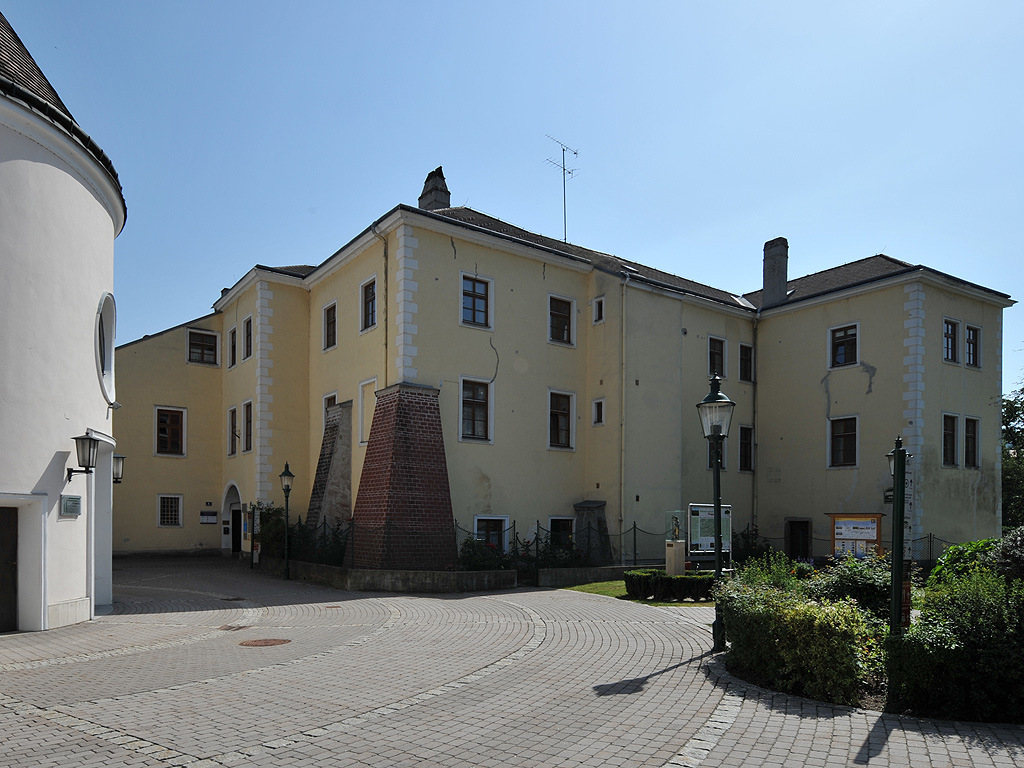 Purkersdorf: Bezirksgericht, ehemaliges Schloss Purkersdorf, Hauptplatz 6